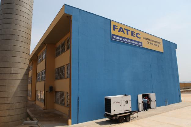 Prédio Novo - Apresentação